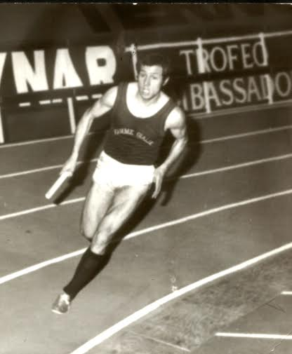 Campionati italiani indoor 1975